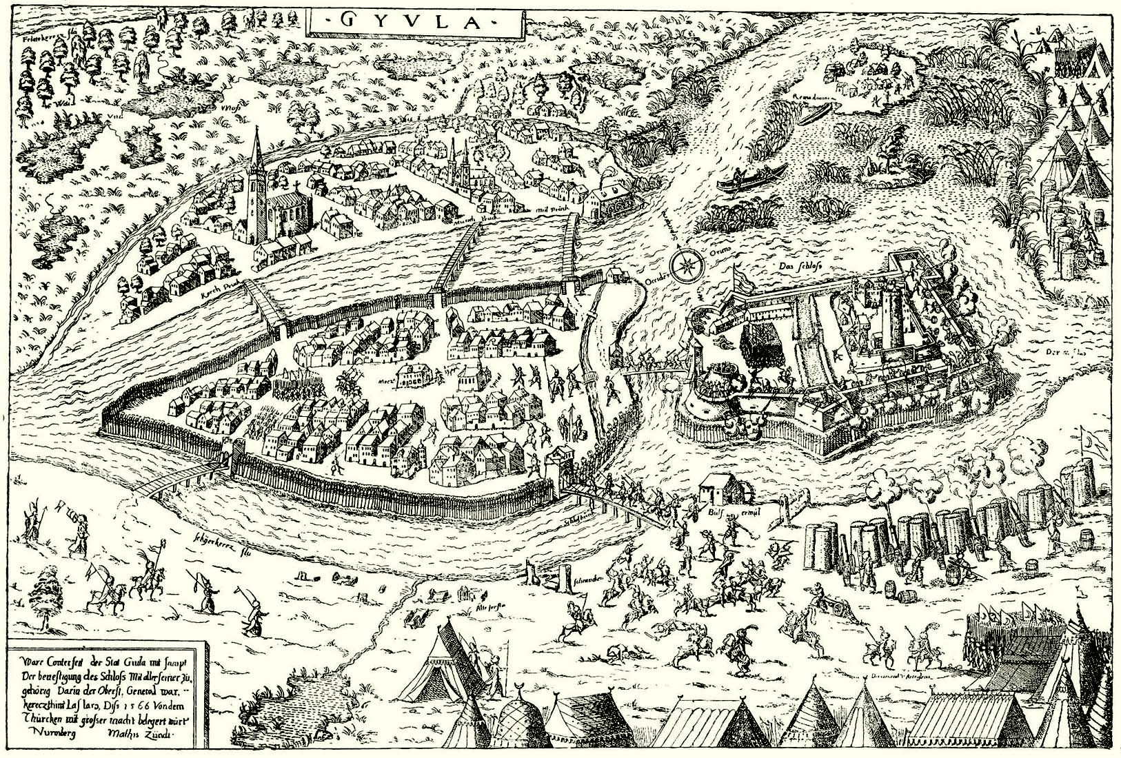 Mathias Zündt, Gyula 1566-ban